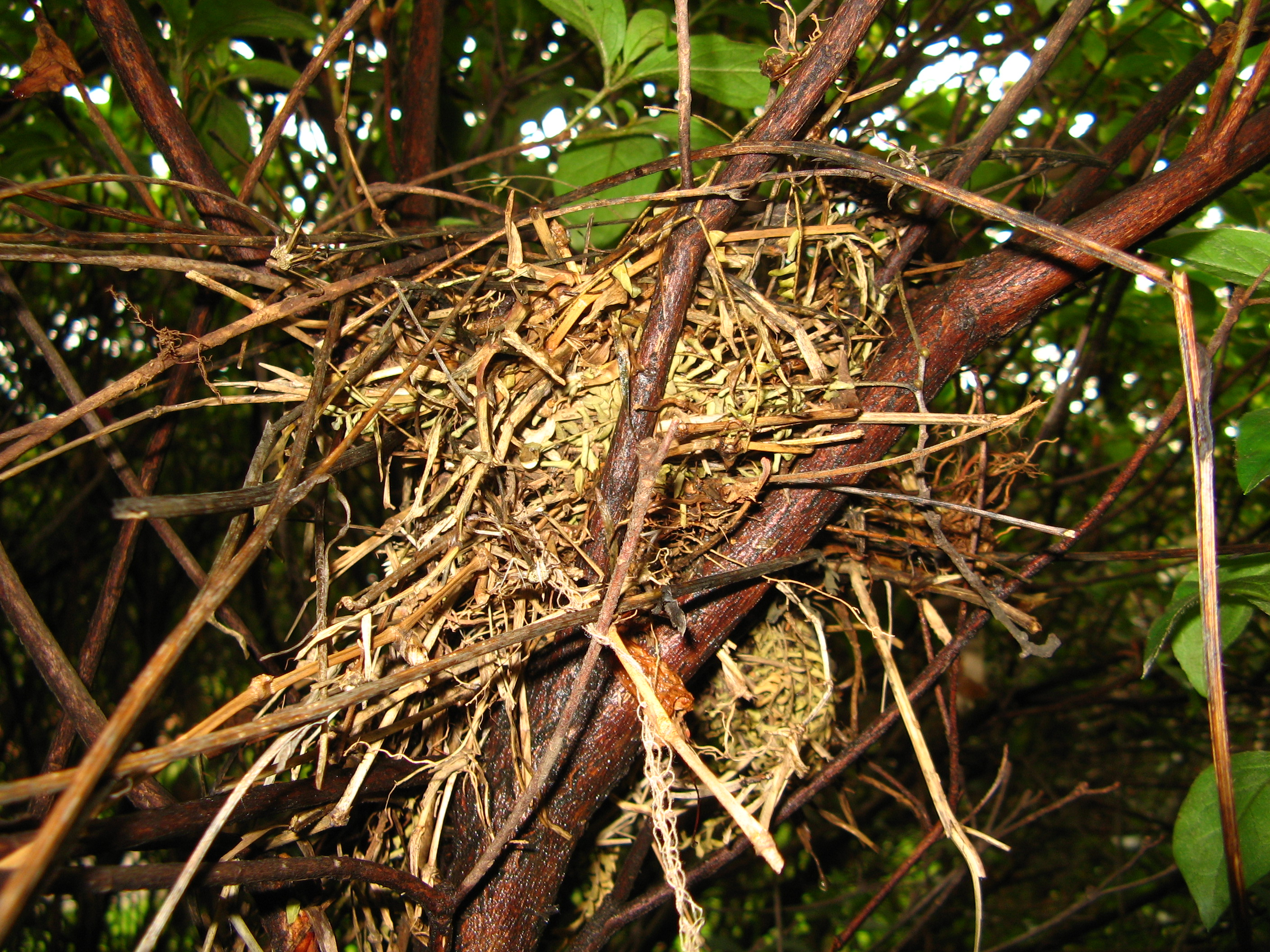 Sabiá-do-campo Mimus saturninus nest in jambeiro tree. Ceret Sao Paulo, Brasil.